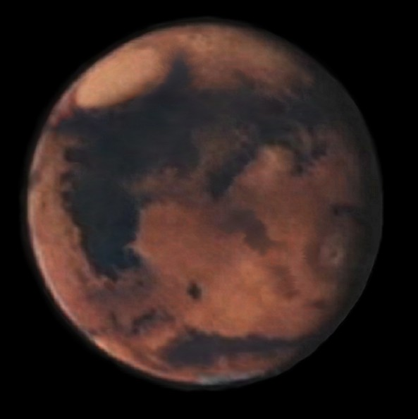 planet Super-Mars